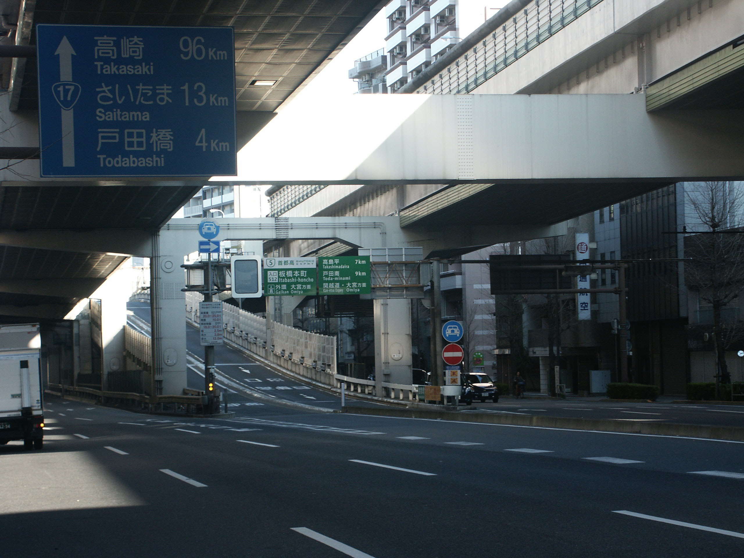 首都高速5号池袋線板橋本町出入口（美女木JCT方面側）